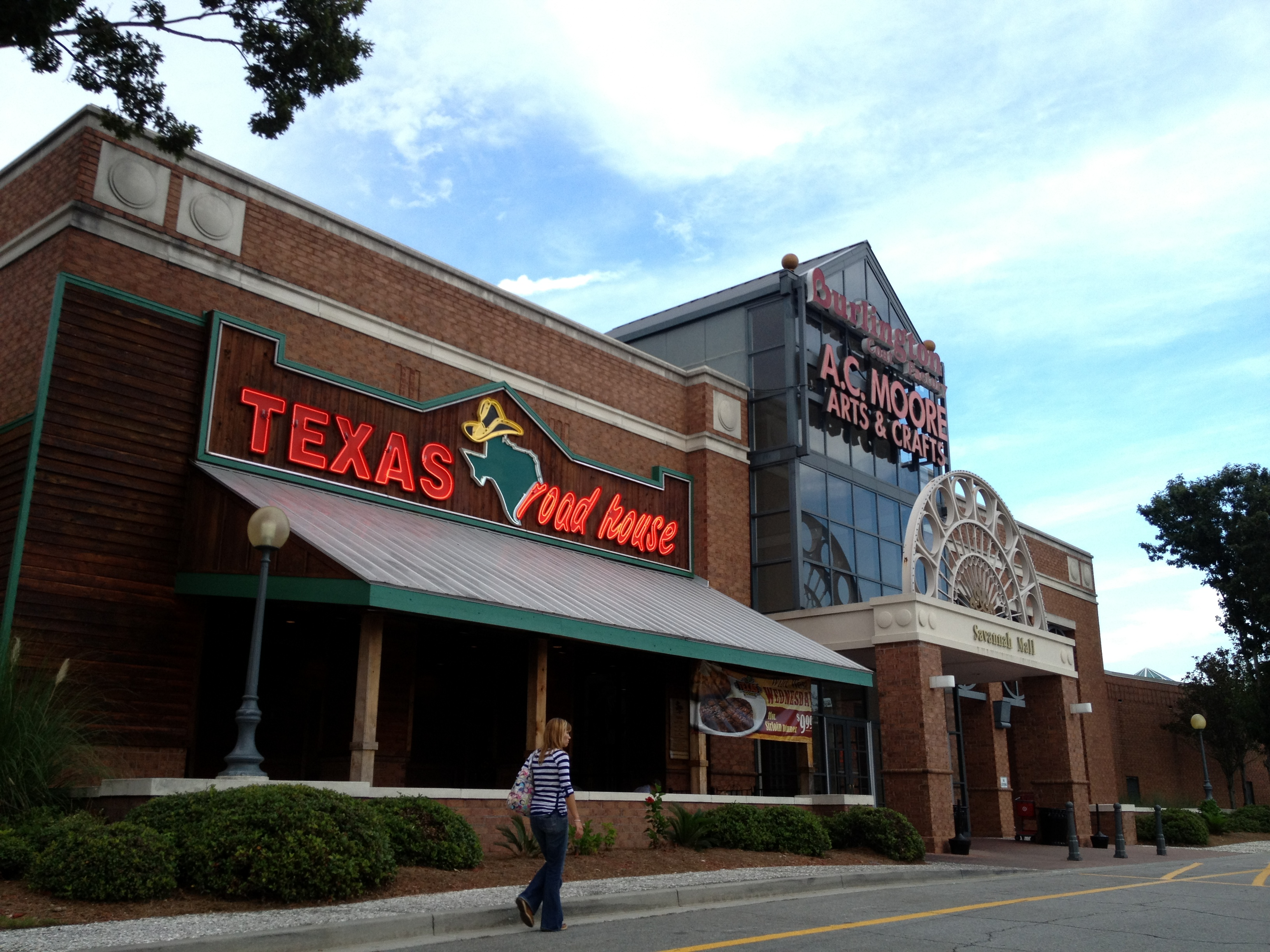 Savannah Mall